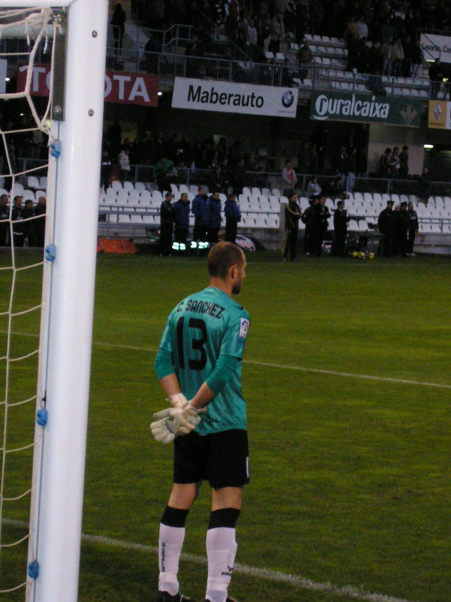 Carlitos Sánchez